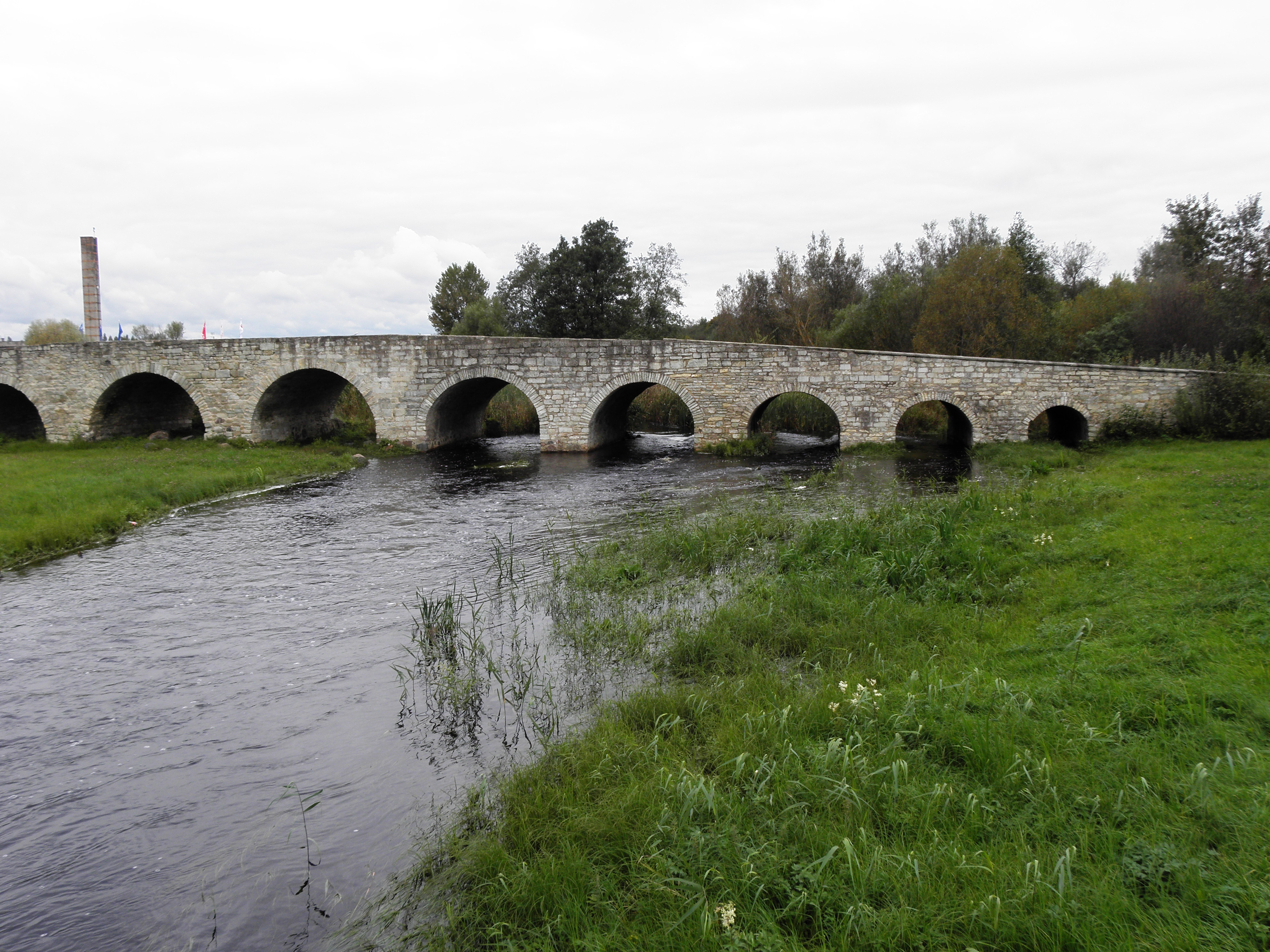 Põduste jõgi Kuressaares. Jõgi voolab Kuressaare suursilla alt läbi. Saaremaal.